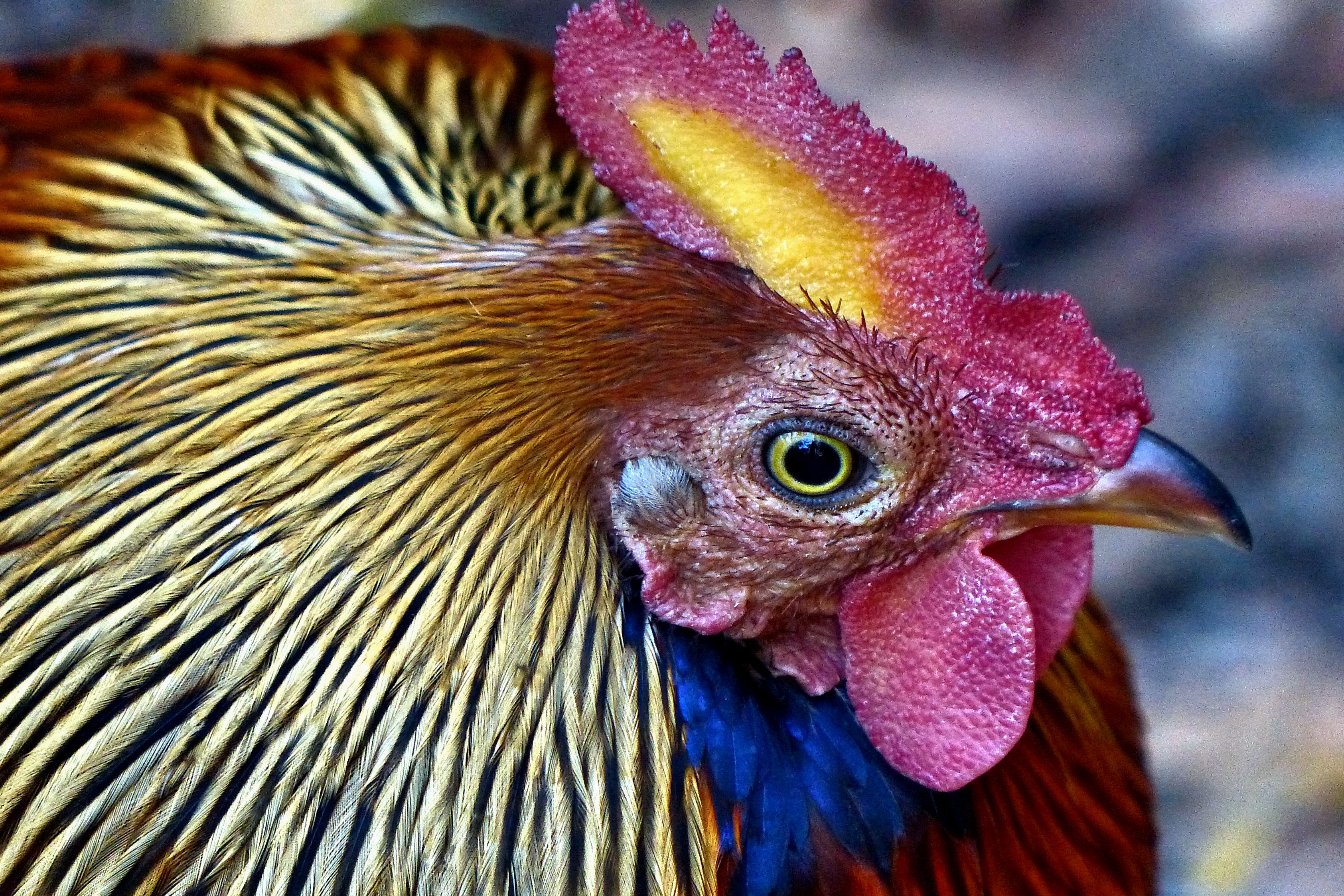 Wilder Hahn in Horton Plains, Sri Lanka